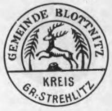 Altes Siegel bzw. Stempel der Gemeinde Blottnitz im Kreis Groß Strehlitz.